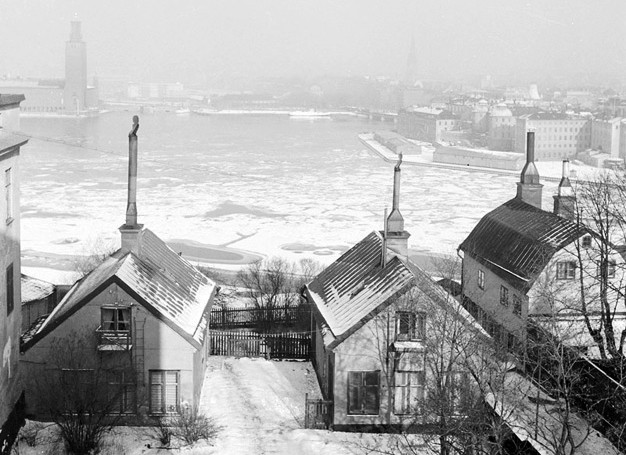 "Tvillinghusen" i kvarteret Kattöra, t.h. syns Blecktornsgränd nr 1